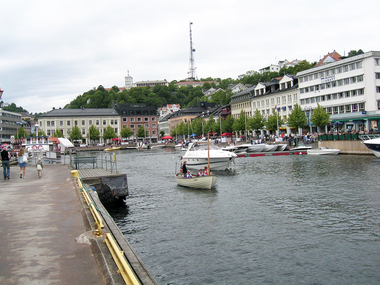 Pollen i Arendal sett fra Tyholmen